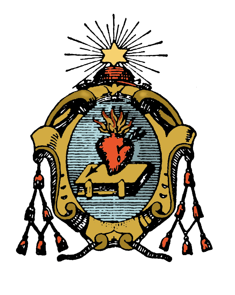 Escudo de la Orden de Agustinos Recoletos